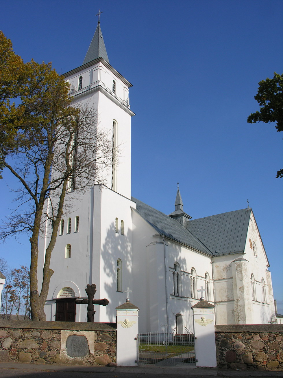 Viekšnių Šv. Jono Krikštytojo bažnyčia, Mažeikių raj., Viekšniai Foto: Algirdas, 2005 m. spalio 20 d.